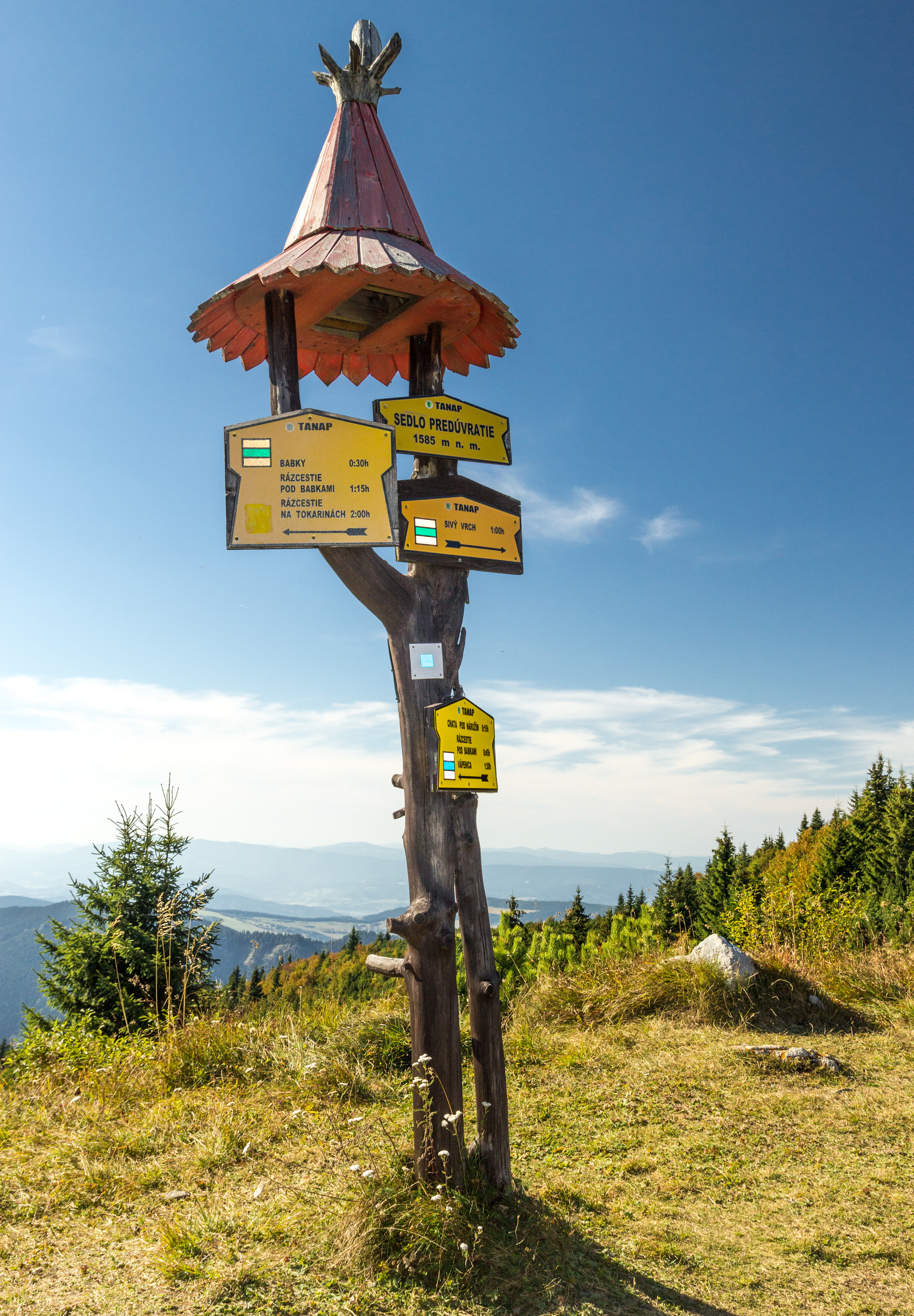 Przedwrocie - oznaczenie szlaków.